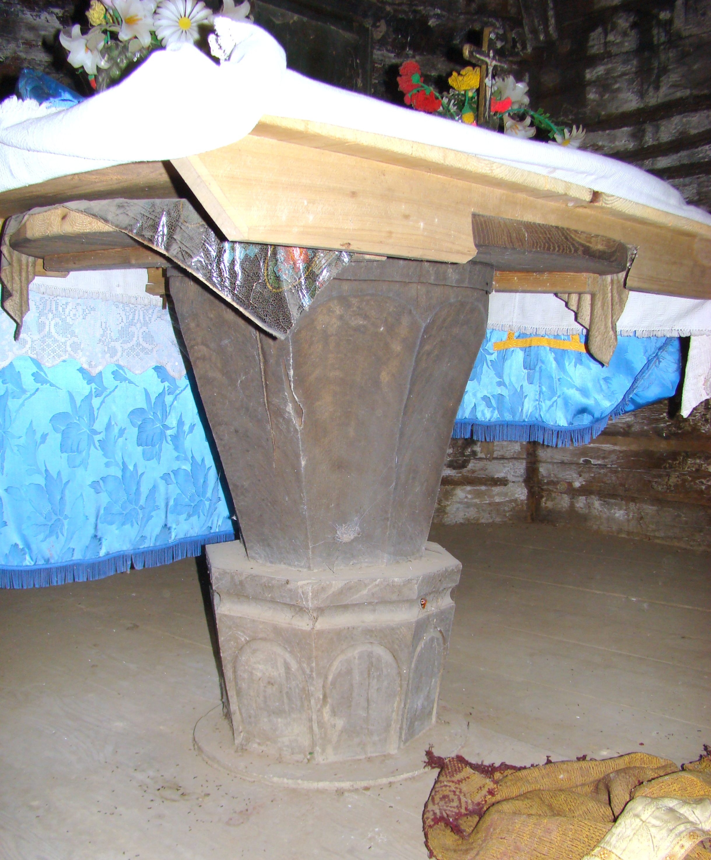 Biserica de lemn „Sf. Vasile cel Mare”, sat Dragu; comuna Dragu, judeţul Sălaj